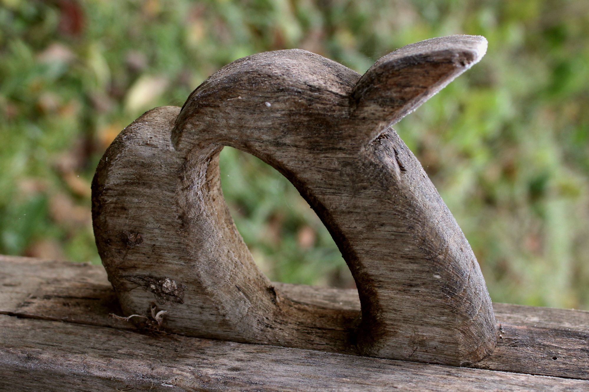 Рукоятка самодельного фуганка. Витебская обл. Середина 20-го века.